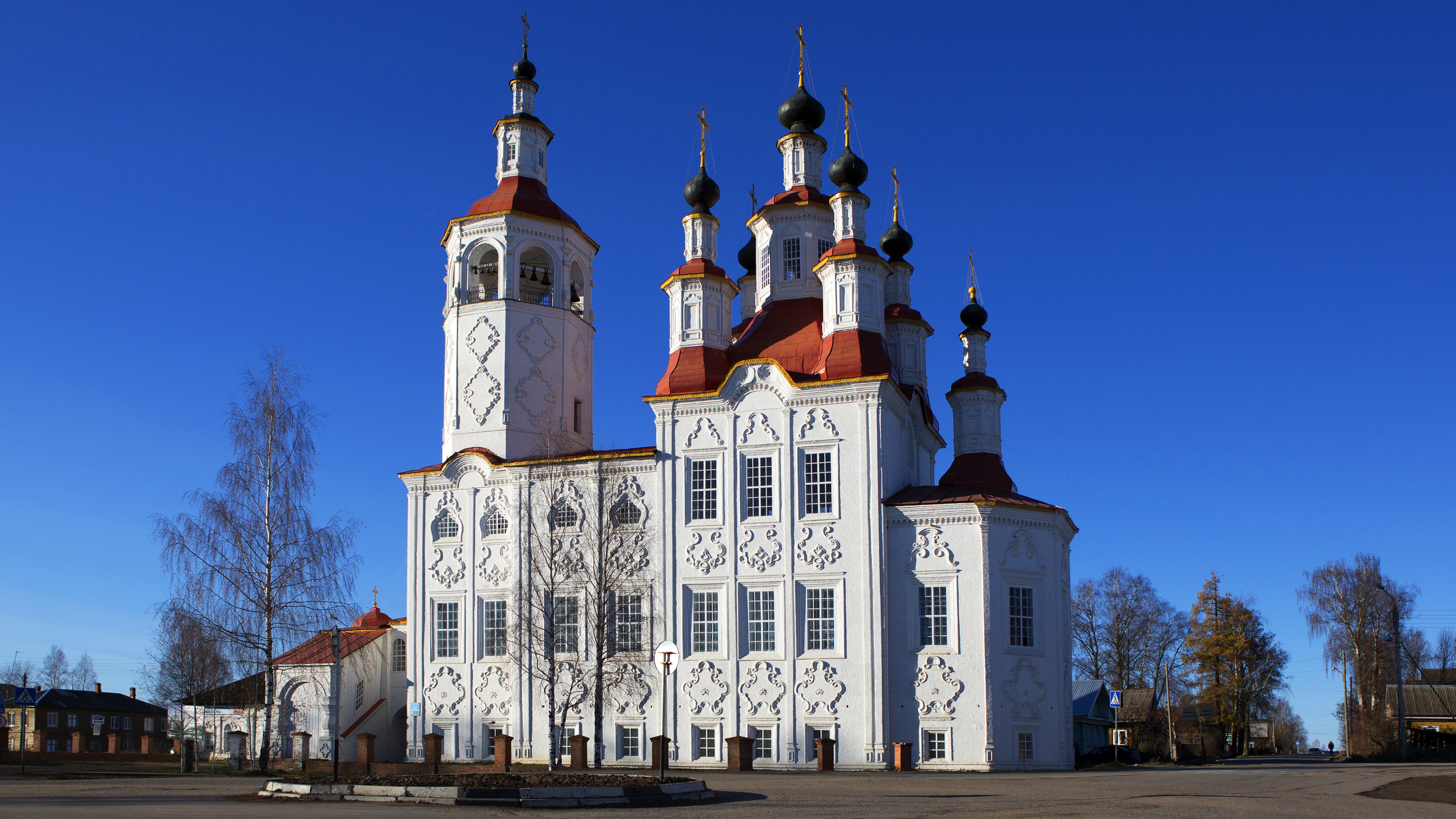 Церковь Входа Господня в Иерусалим (Входоиерусалимская): улица Кирова, 1, Тотьма, Тотемский район, Вологодская область